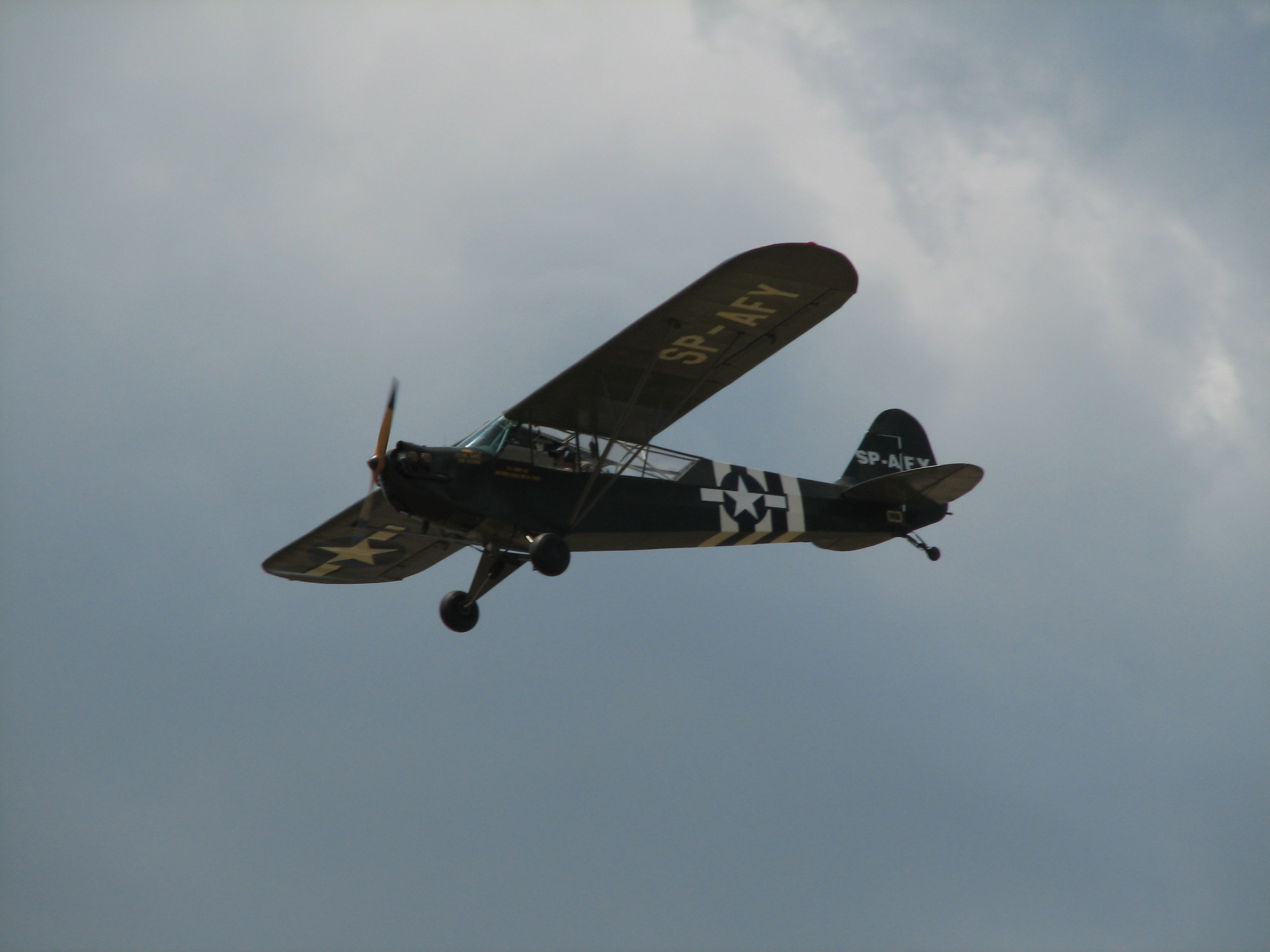 Piper Cub